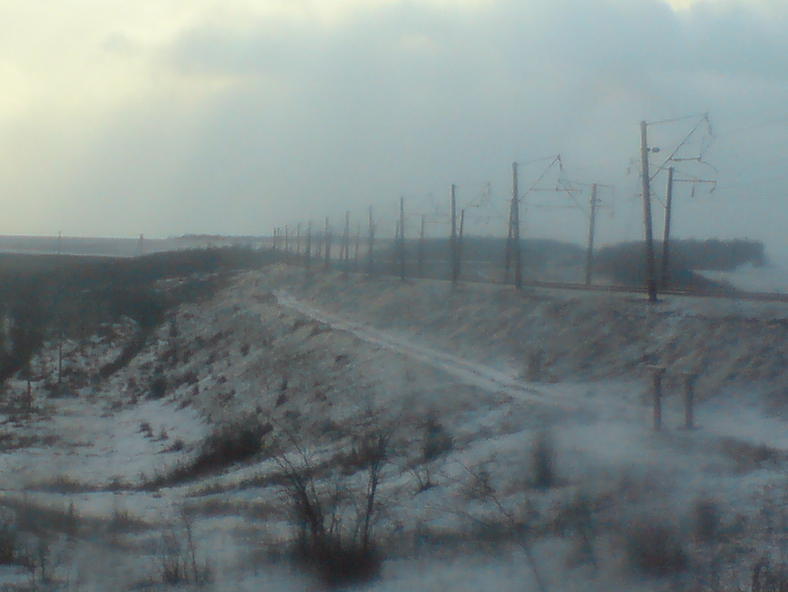 Насип Торосова